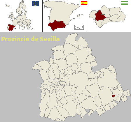 Mapa de localización del municipio sevillano de Aguadulce (Andalucía, España)